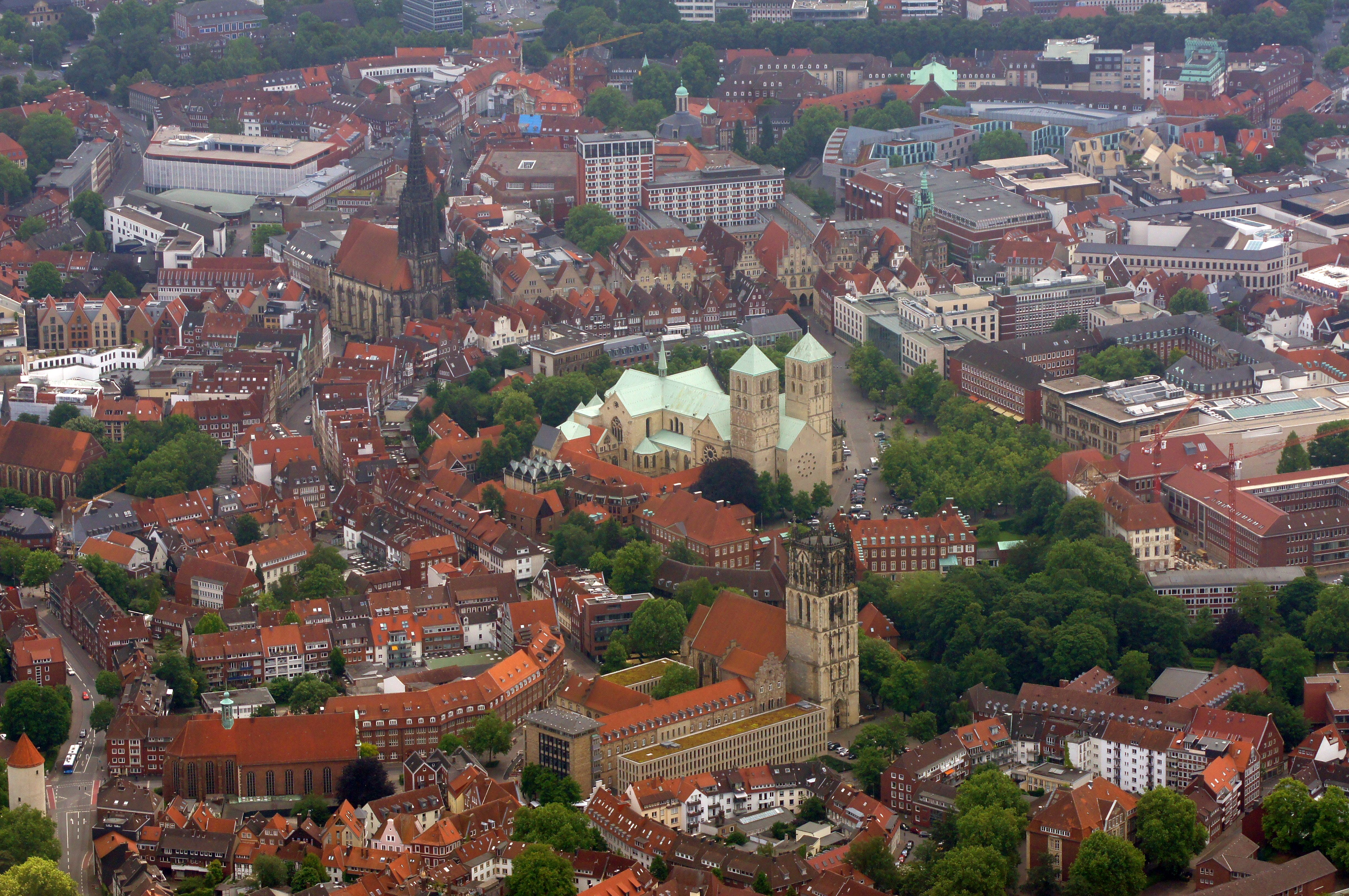 Das Stadtzentrum von Münster, Nordrhein-Westfalen, Deutschland. Das Foto entstand während des Münsterland-Fotoflugs am 1. Juni 2014. Hinweis: Die Aufnahme wurde aus dem Flugzeug durch eine Glasscheibe hindurch fotografiert.